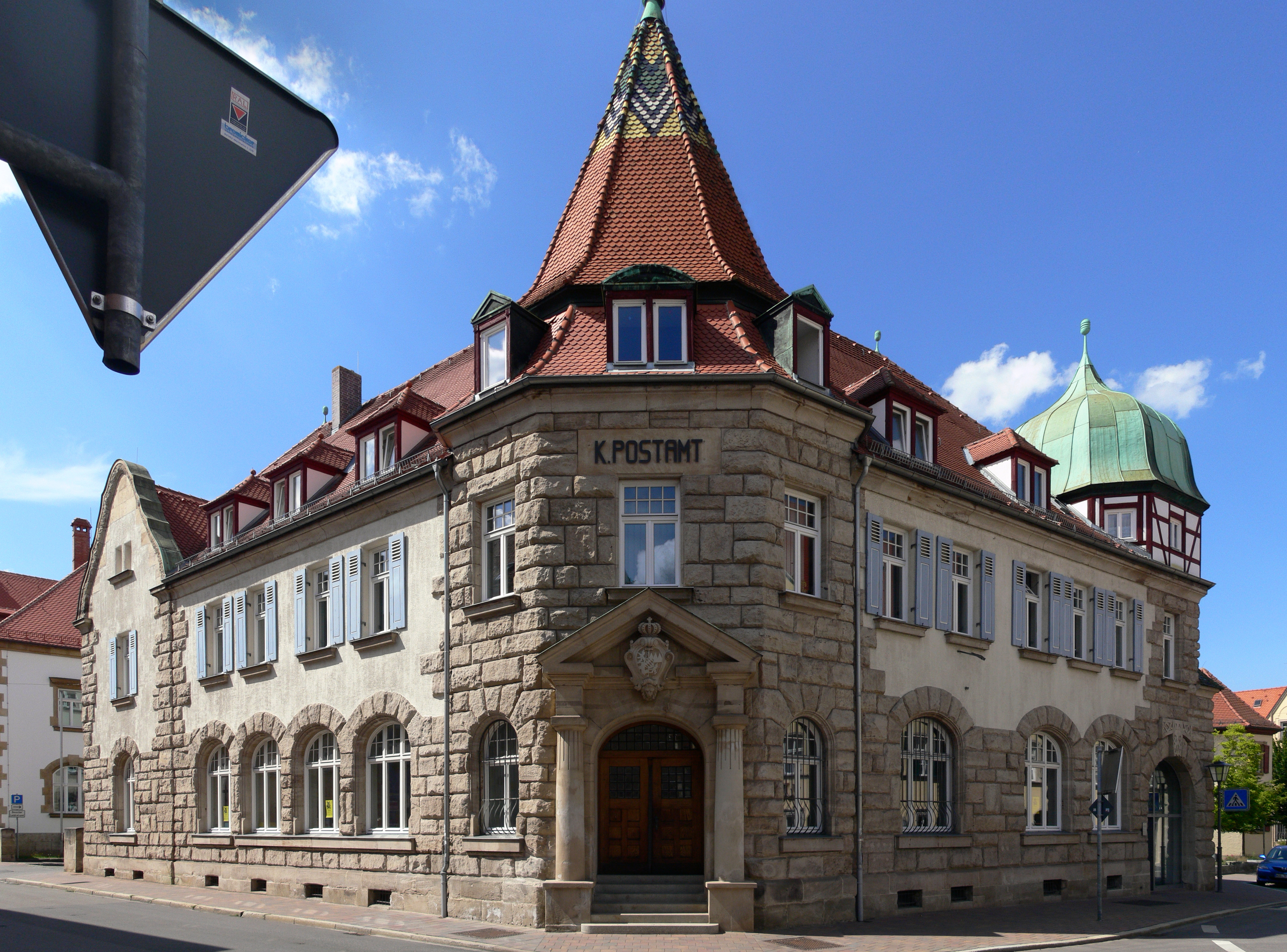 Denkmalgeschütztes Gebäude in Weißenburg (Bayern), Alte Post, Straßenecke Bahnhofstraße/Friedrich-Ebert-Straße